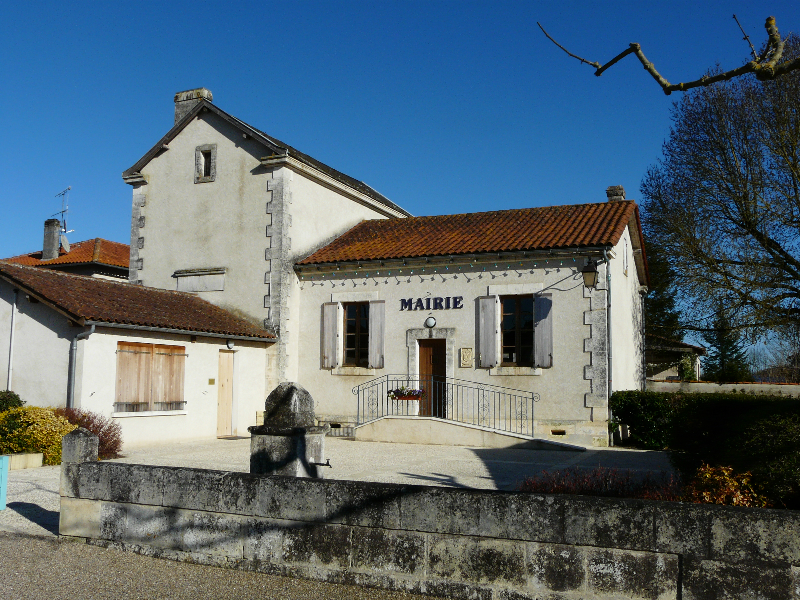 La mairie de Saint-Vincent-Jalmoutiers, Dordogne, France.